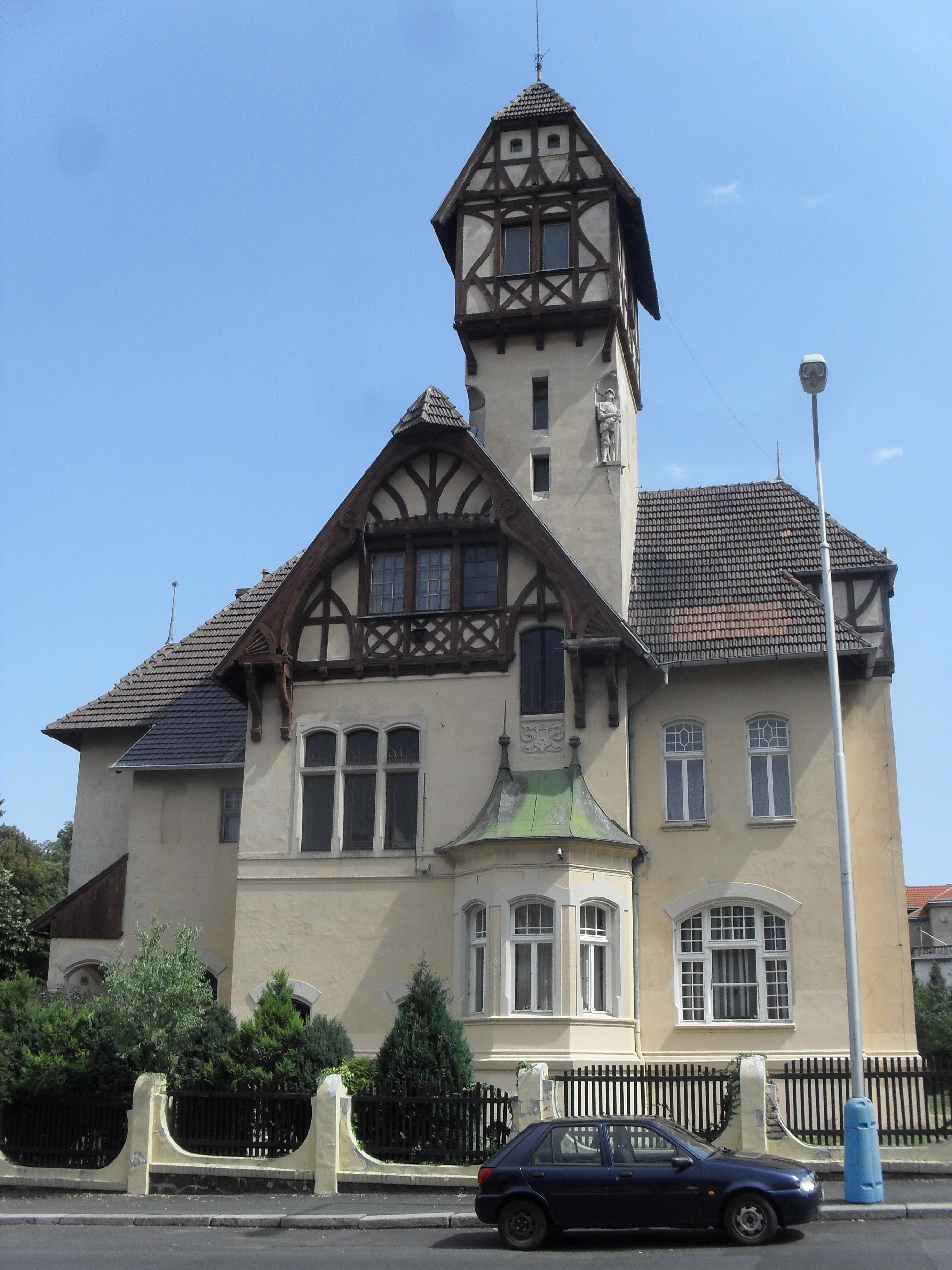 Vila (Teplice) - Pod Doubravkou 1348/10, Teplice